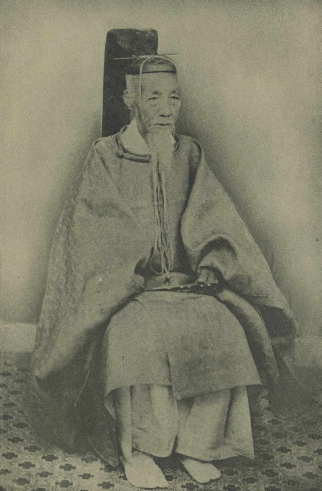 大原重徳の肖像。